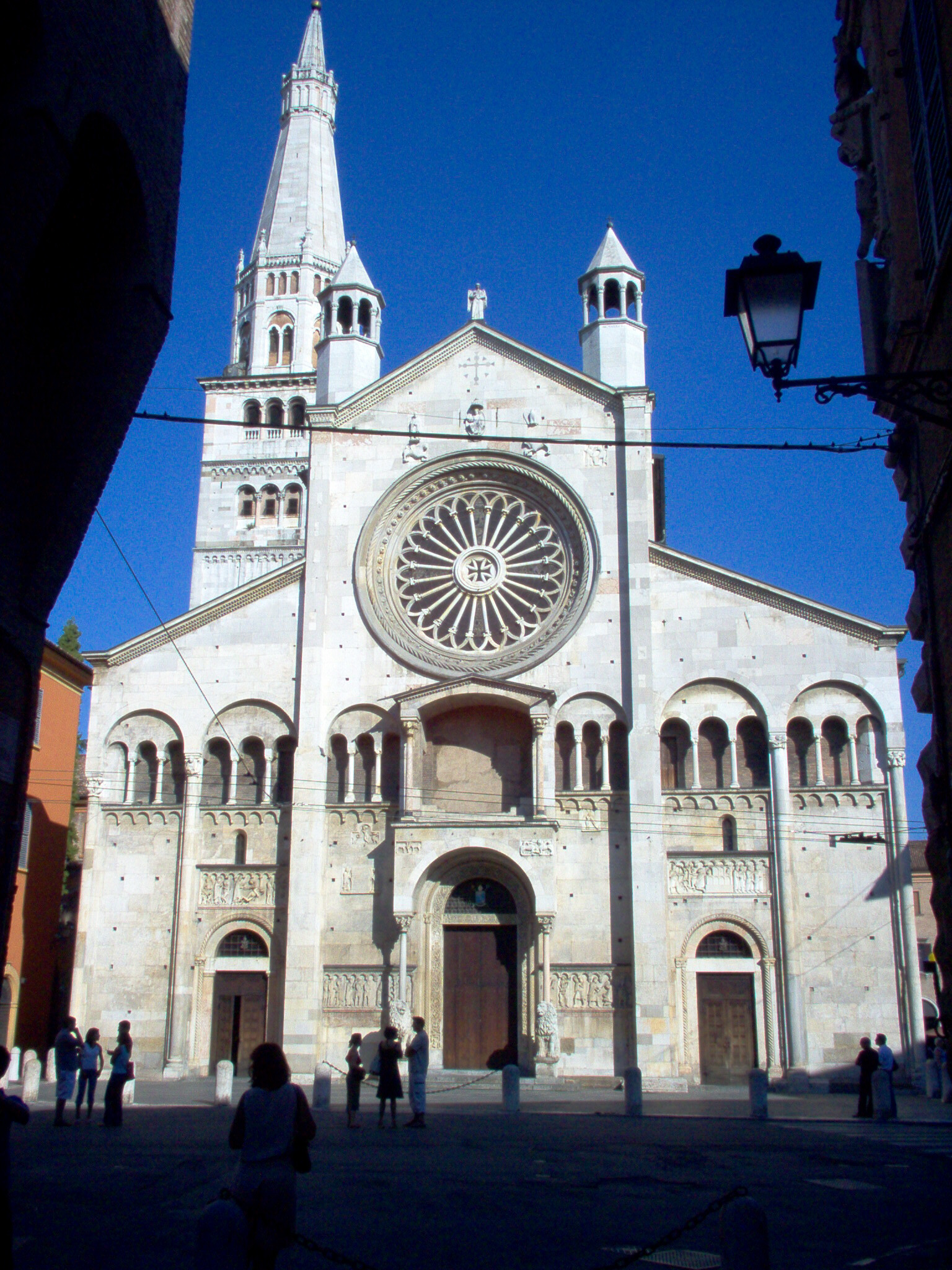 Duomo This is a photo of a monument which is part of cultural heritage of Italy.